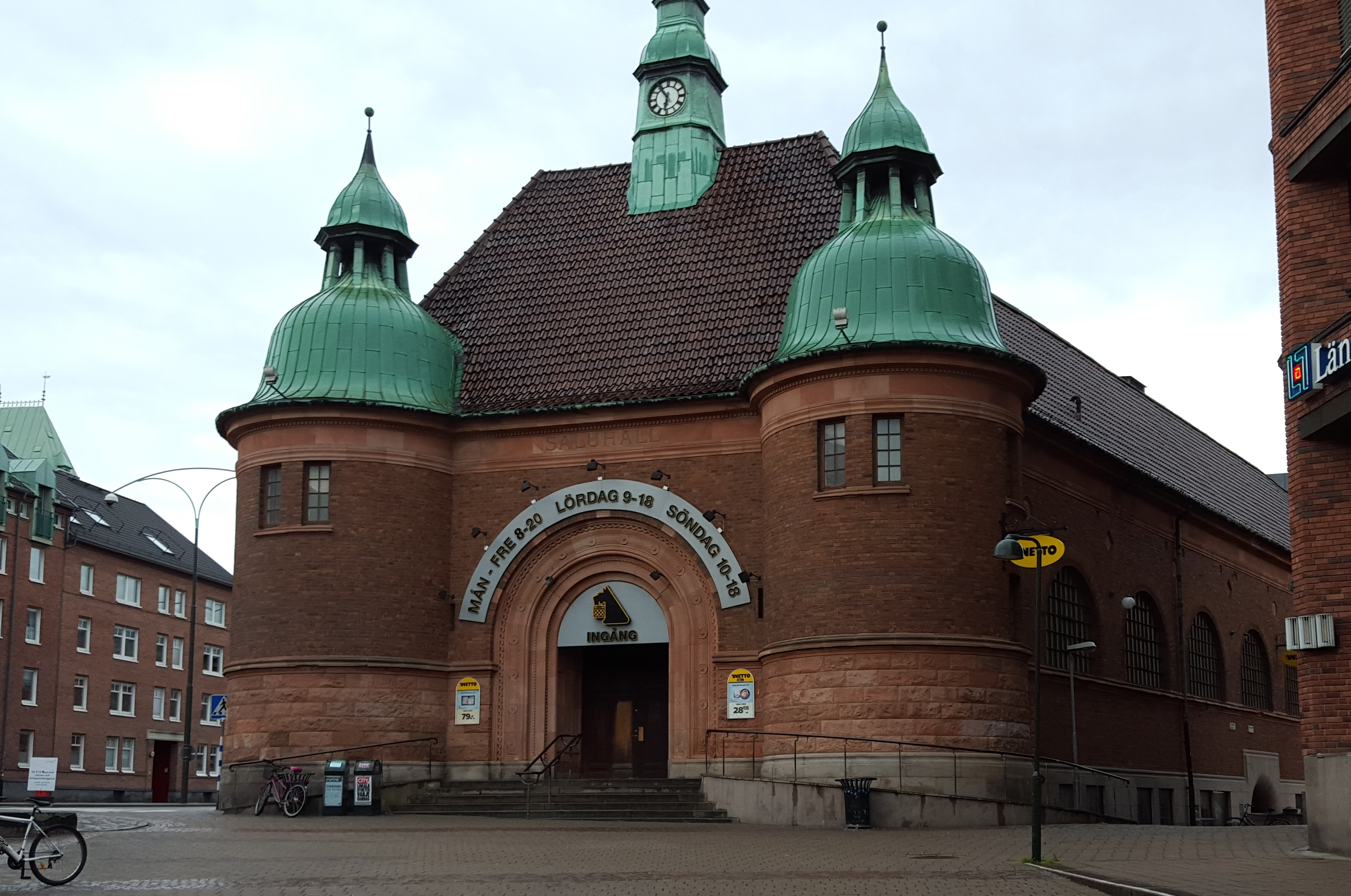 Netto Saluhallen i Malmö en tidig morgon